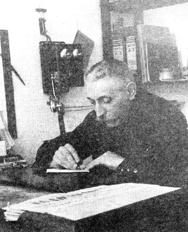 Enrique Heraclio Botana, traballando no seu despacho da Casa do Pobo de Vigo.